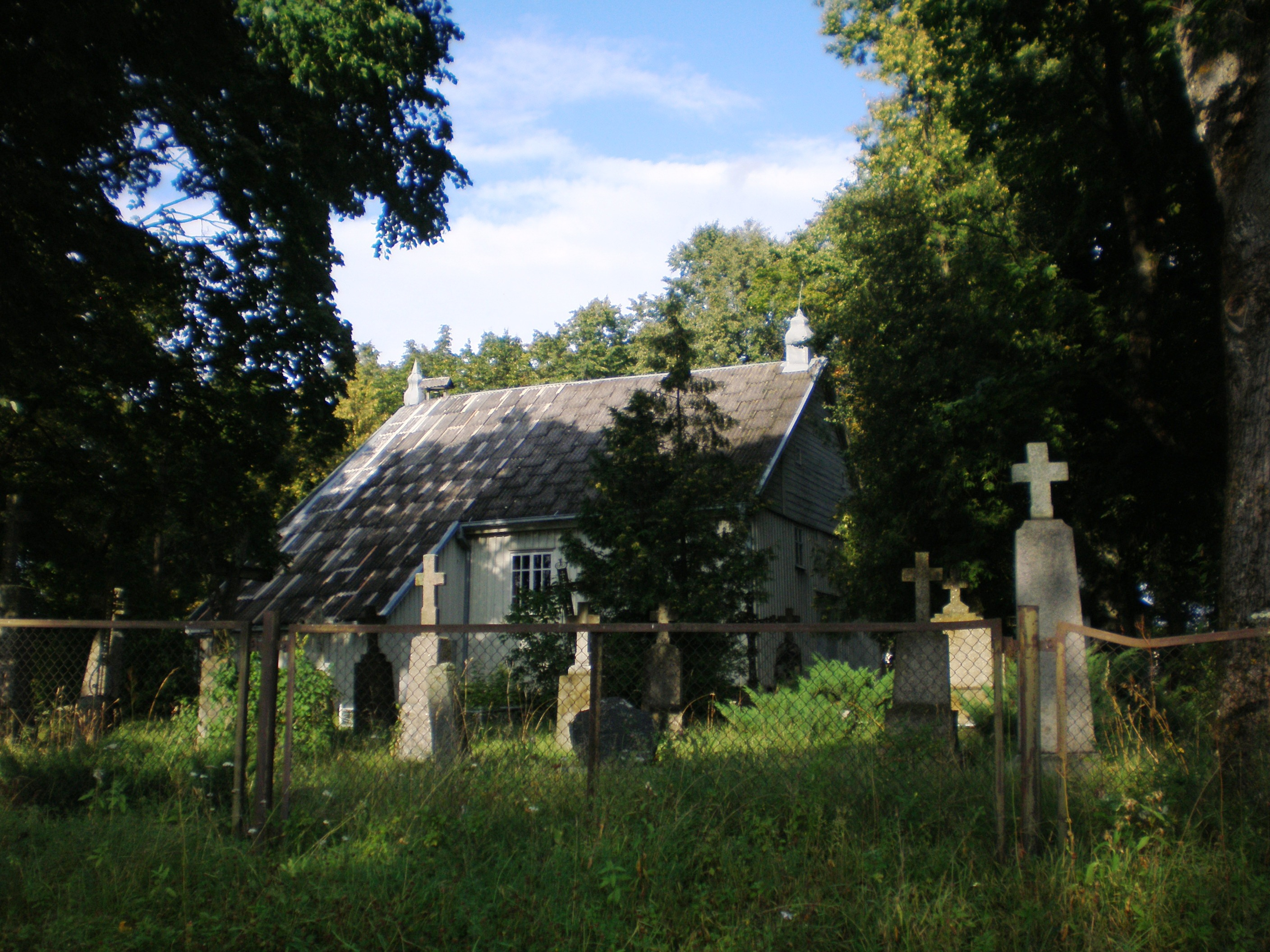 Pajieslio bažnyčia, Kėdainių raj., Lietuva